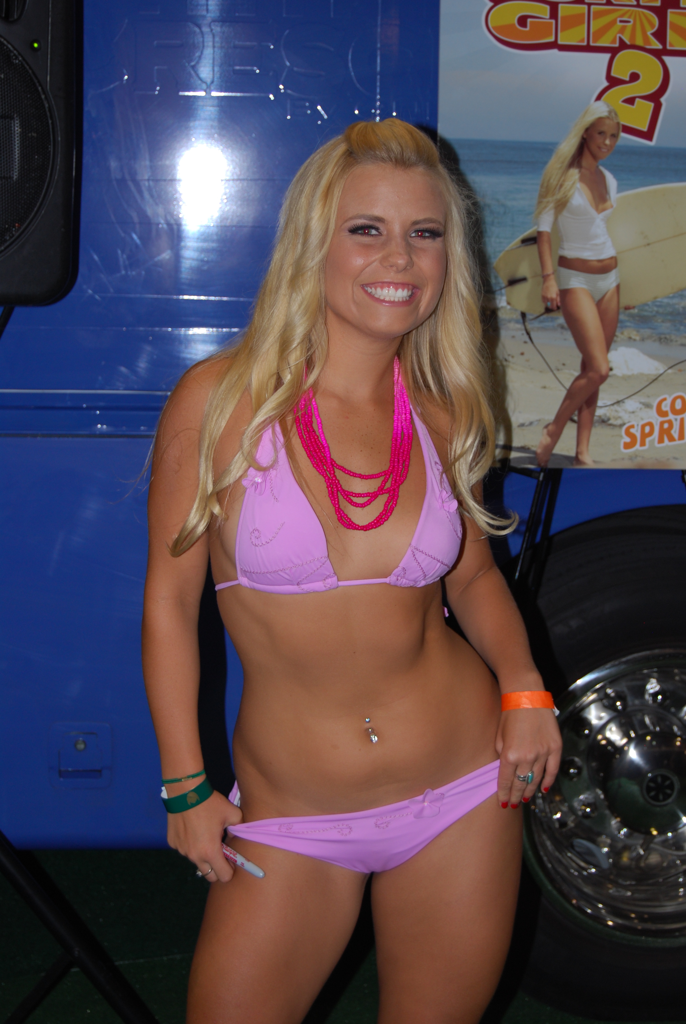 AEE2008_Nikon_Day2 366